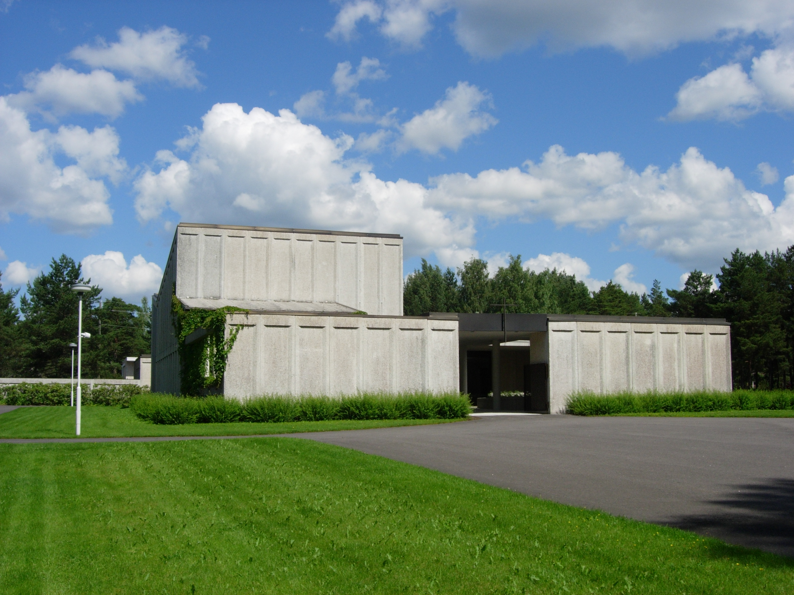 Turun Kärsämäen hautausmaan siunauskappeli. Heikki Sarainmaa, 1980.